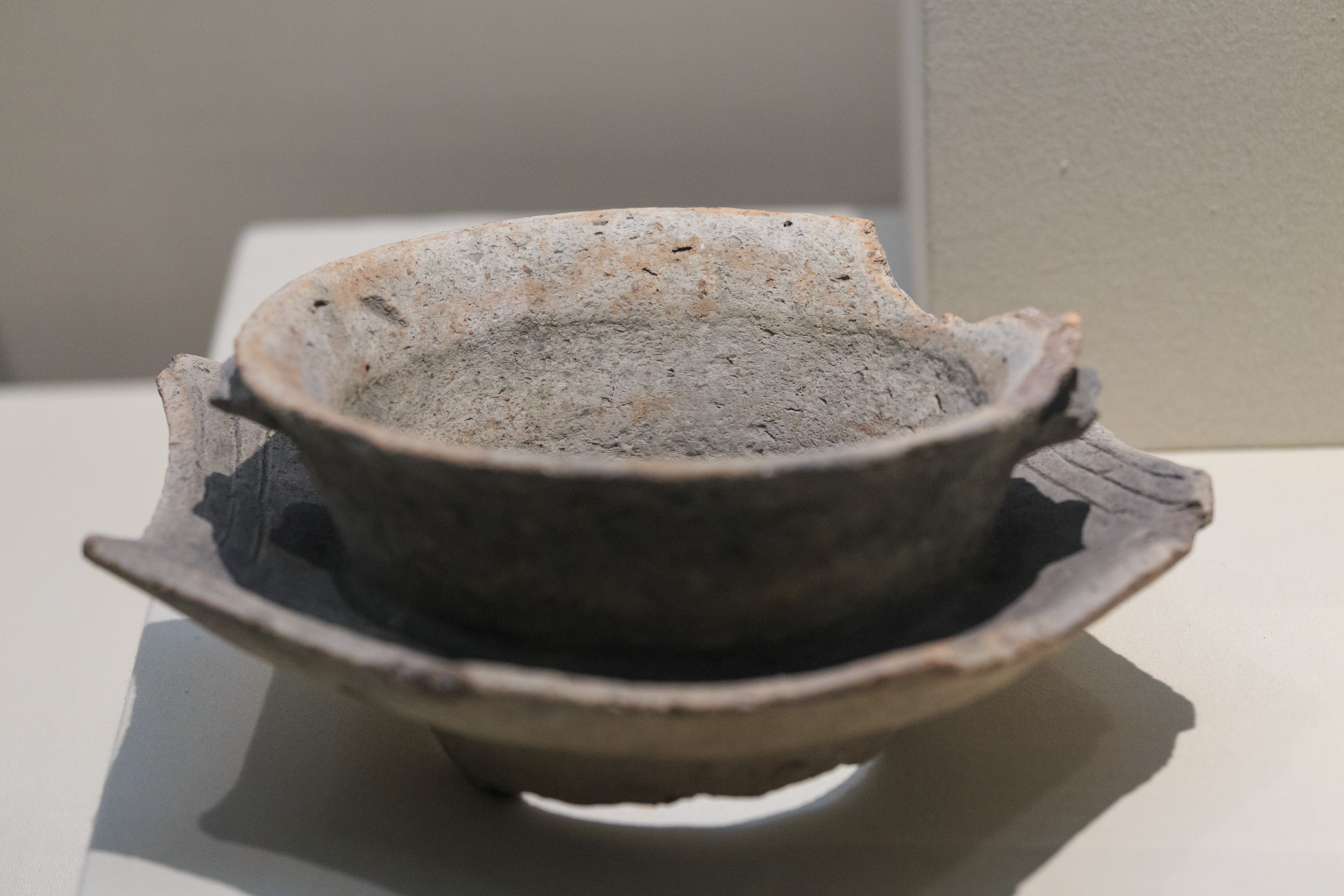 浙江省博物馆武林馆区—— 陶腰沿釜，罗家角遗址出土（马家浜文化）